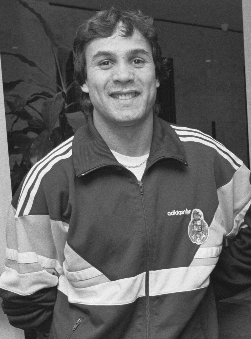 Collectie / Archief : Fotocollectie Anefo Reportage / Serie : [ onbekend ] Beschrijving : FC Porto (in verband met wedstrijd om Super Cup tegen Ajax); speler Madjer (l) en trainer Ivic in het hotel Datum : 23 november 1987 Trefwoorden : spelers, sport, trainers, voetbal Persoonsnaam : Fc Porto, Ivic Instellingsnaam : AJAX Fotograaf : Molendijk, Bart / Anefo Auteursrechthebbende : Nationaal Archief Materiaalsoort : Negatief (zwart/wit) Nummer archiefinventaris : bekijk toegang 2.24.01.05 Bestanddeelnummer : 934-1340